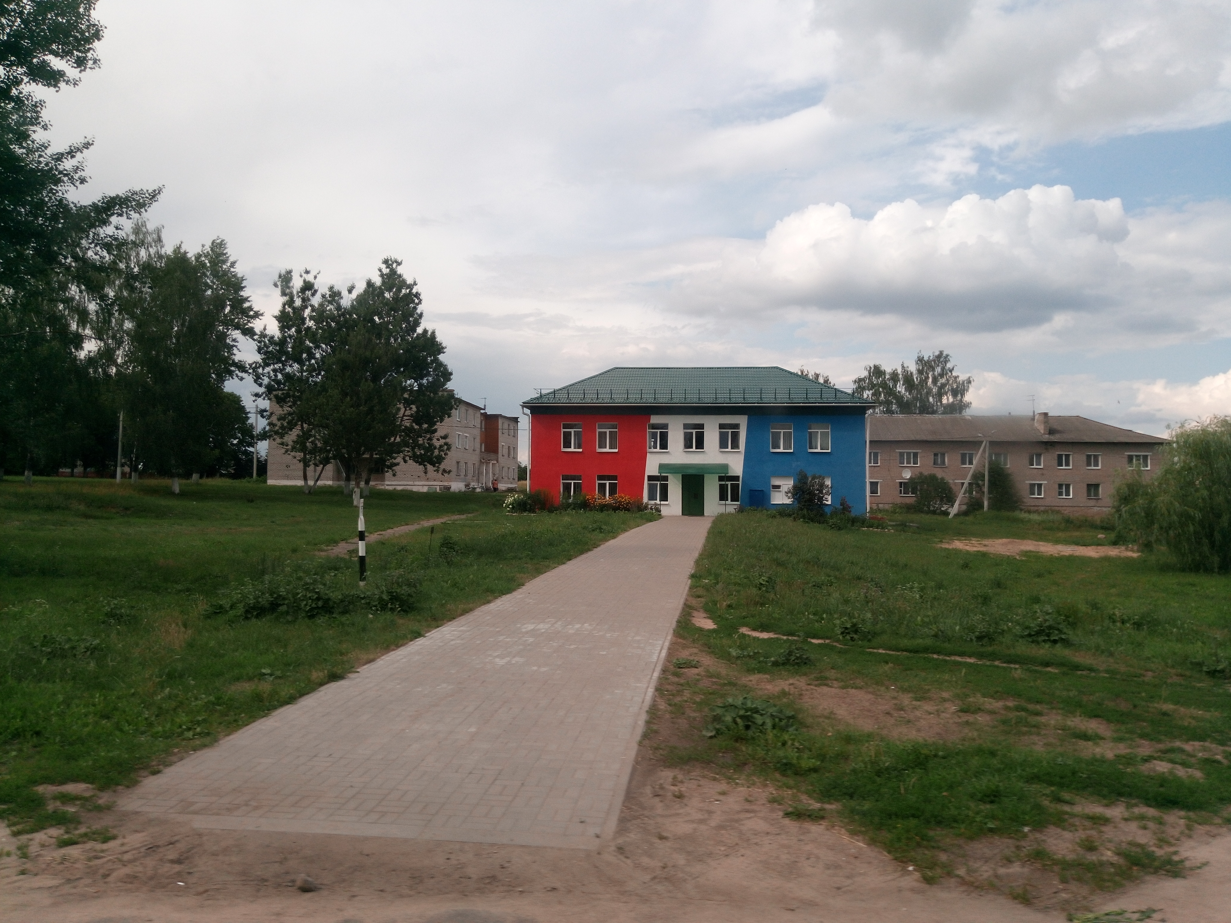 Вуліца Цэнтральная